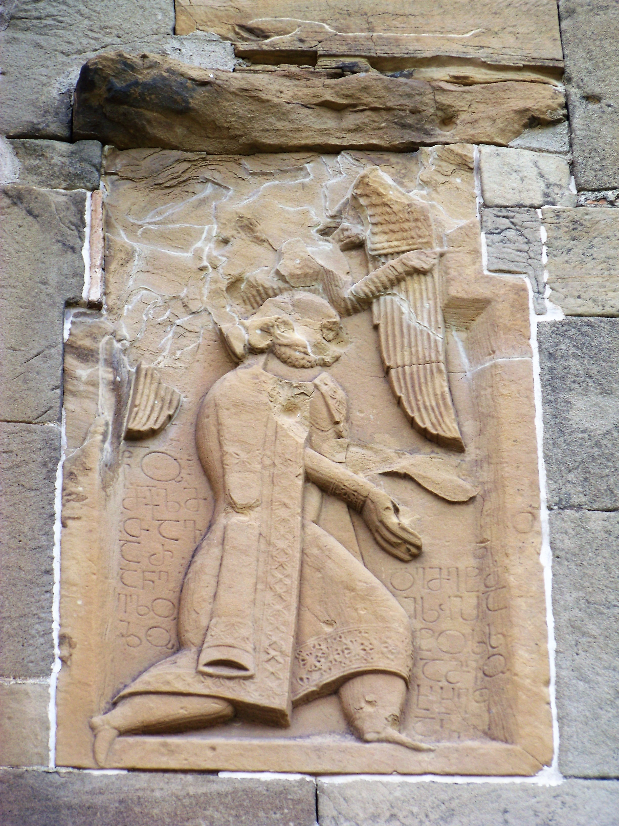 ჯვრის მონასტრის ბარელიეფი